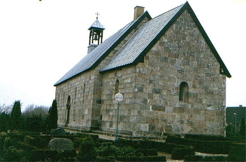 Mammen Kirke, (Viborg Kommune),set fra sydøst